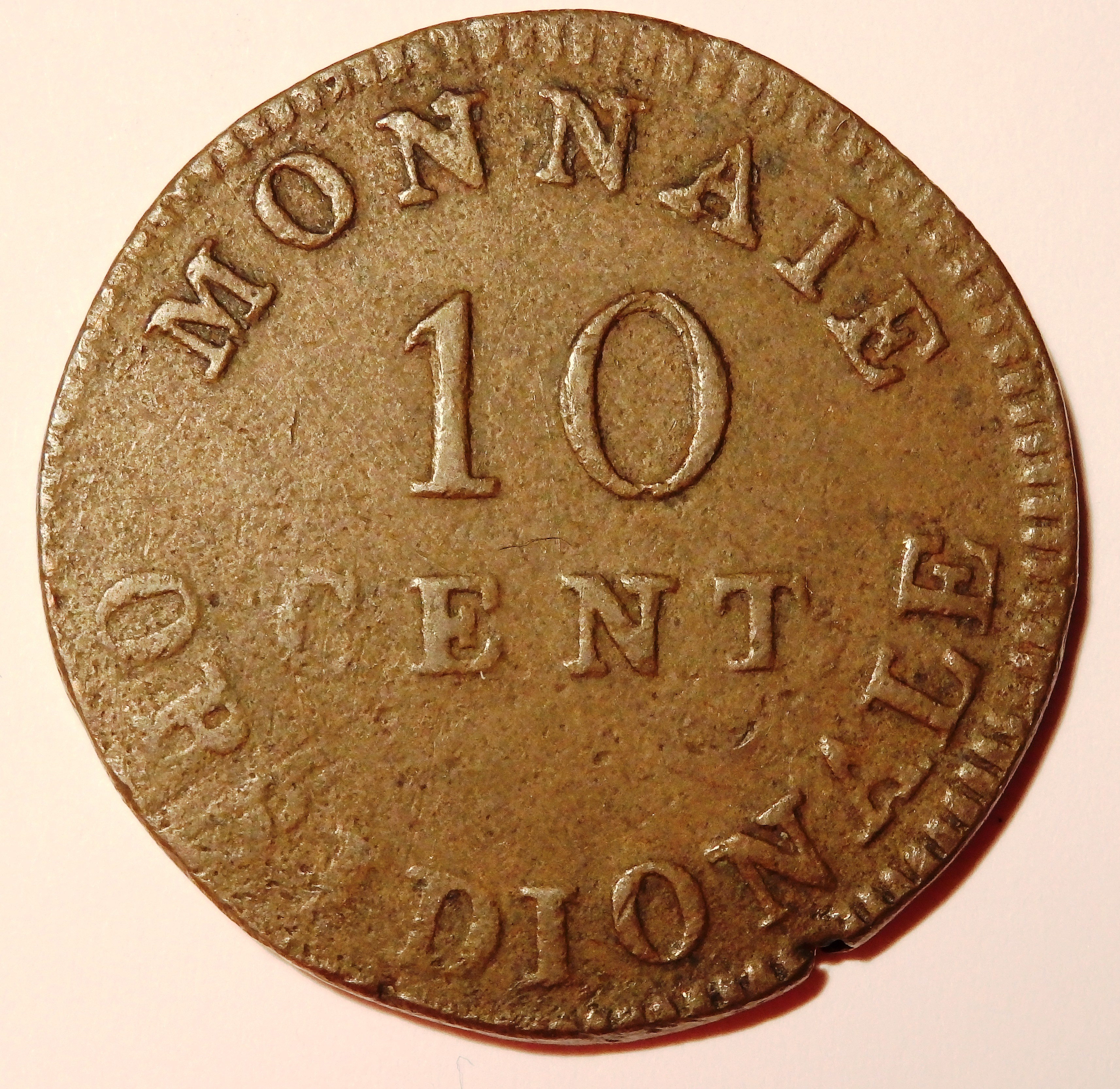 Wertseite der Belagerungsmünze, Umschrift: MONNAIE OBSIDIONALE